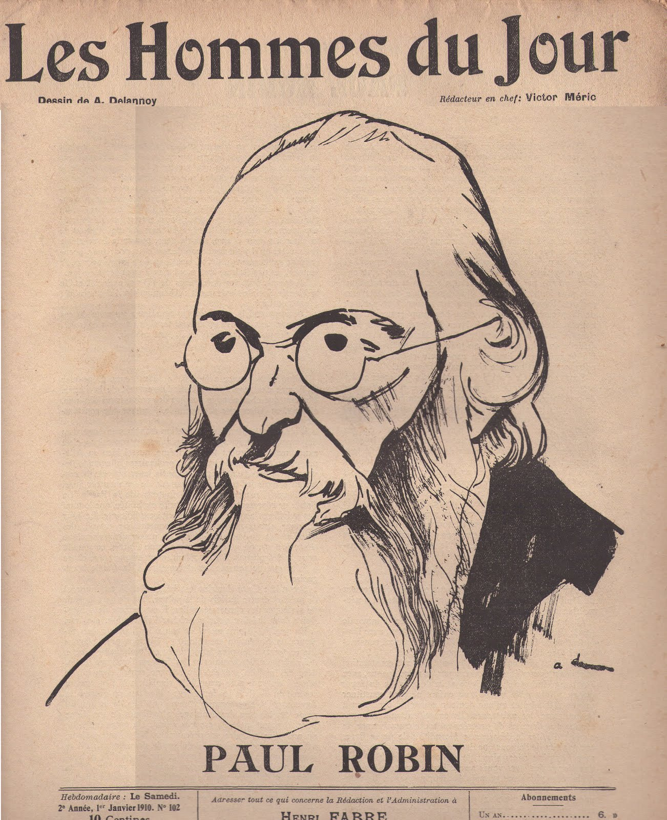 Paul Robin (3 avril 1837 à Toulon, France - 31 août 1912 à Paris) est un pédagogue libertaire français, connu en particulier pour avoir développé l'éducation intégrale à l'orphelinat de Cempuis. Il disait : « La science officielle de l'éducation ne trouve rien de mieux à faire des jeunes adolescents que de les enfermer : les privilégiés au collège, les vulgaires à l'atelier, les parias en prison ».